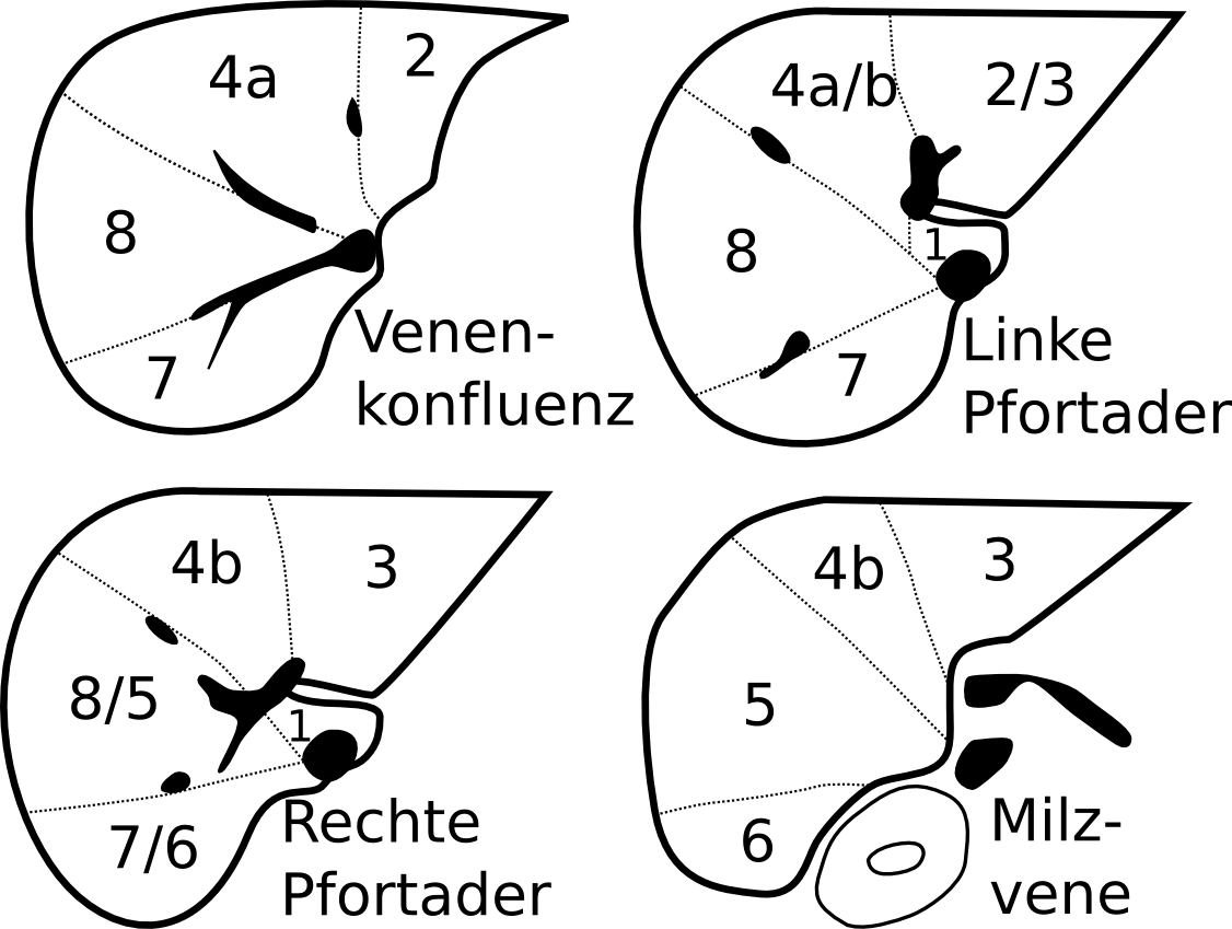 Die Segmente der humanen Leber, wie sie in axialen Schnittbildern zur Darstellung kommen.